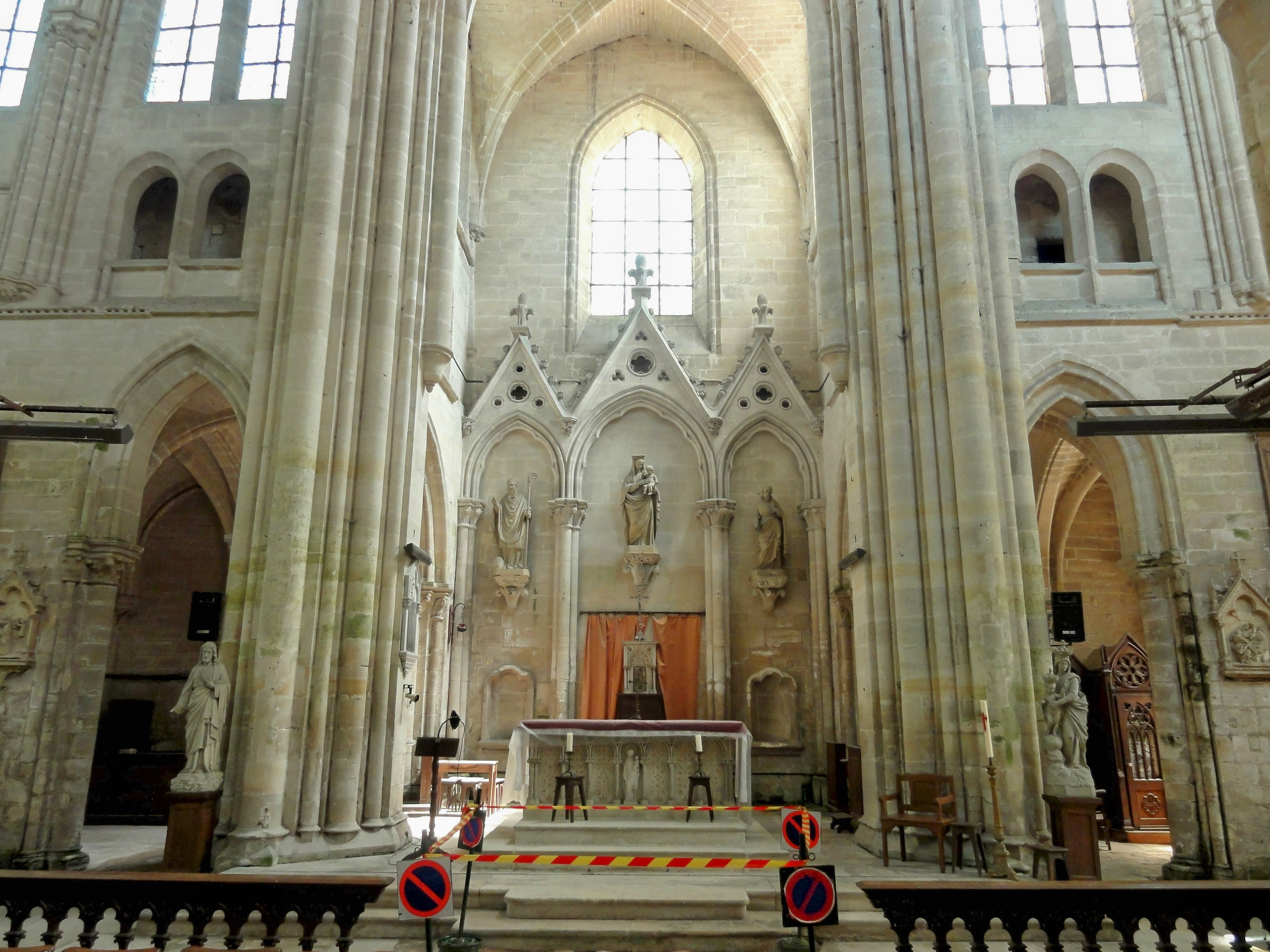 Chœur.